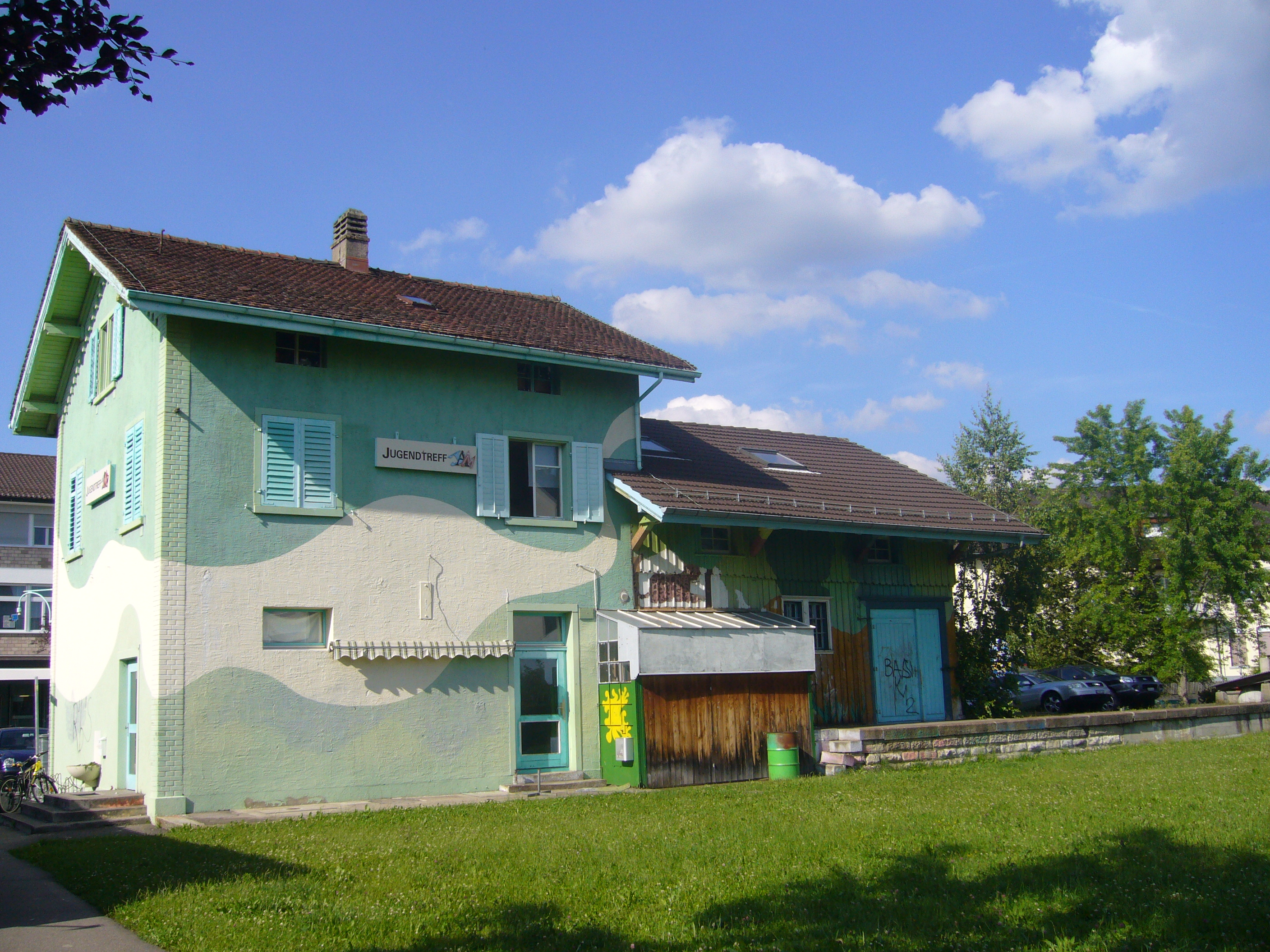 Ehemaliges Bahnhofgebäude Bassersdorf von Südwesten gesehen (abgebrochen im Septemper 2012).